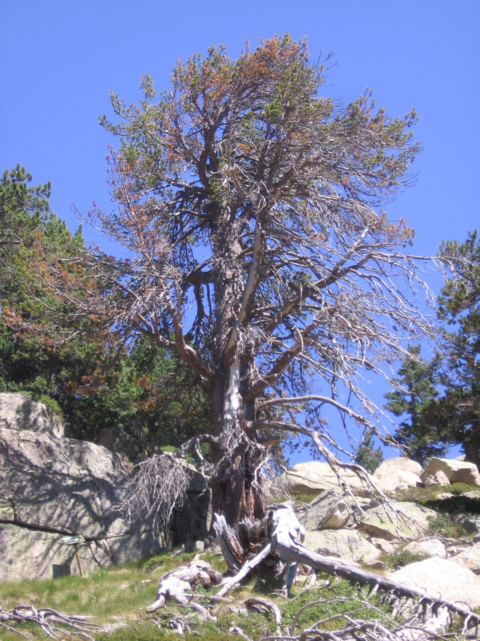 Pino de Amitges, catalogado como árbol singular. Pinus mugo subsp. uncinata.